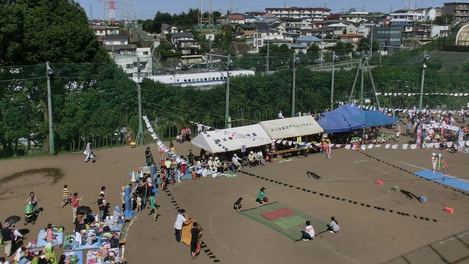 横浜隼人幼稚園の運動会グランド横を通過する新幹線